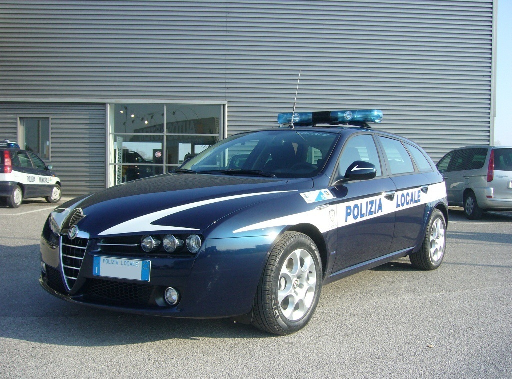 Alfa Romeo 159 Sportwagon appartenente alla Polizia Locale del Veneto.